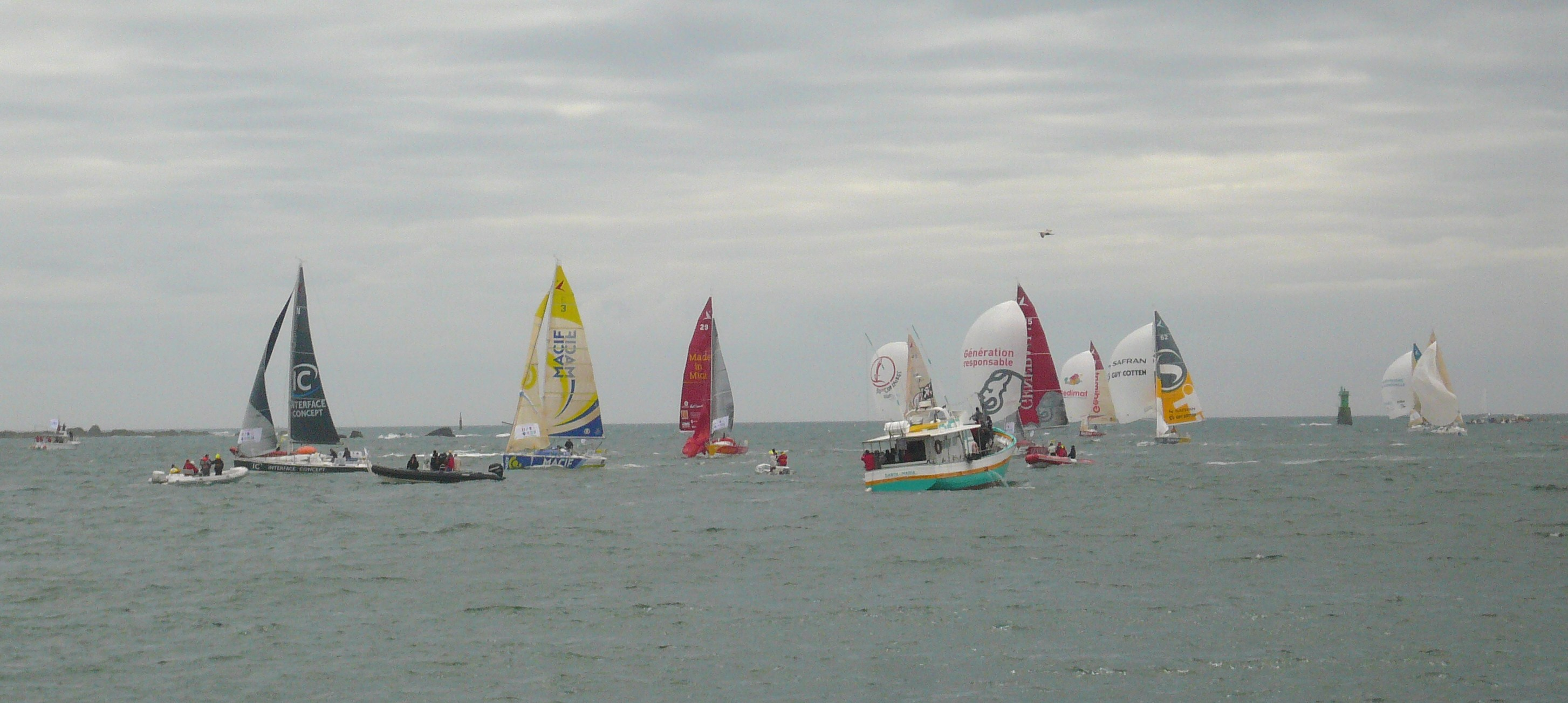 Une partie des concurrents de la transat AG2R-La Mondiale 2014 pendant la phase de régate en baie de La Forêt, Concarneau, Finistère, Bretagne, France.